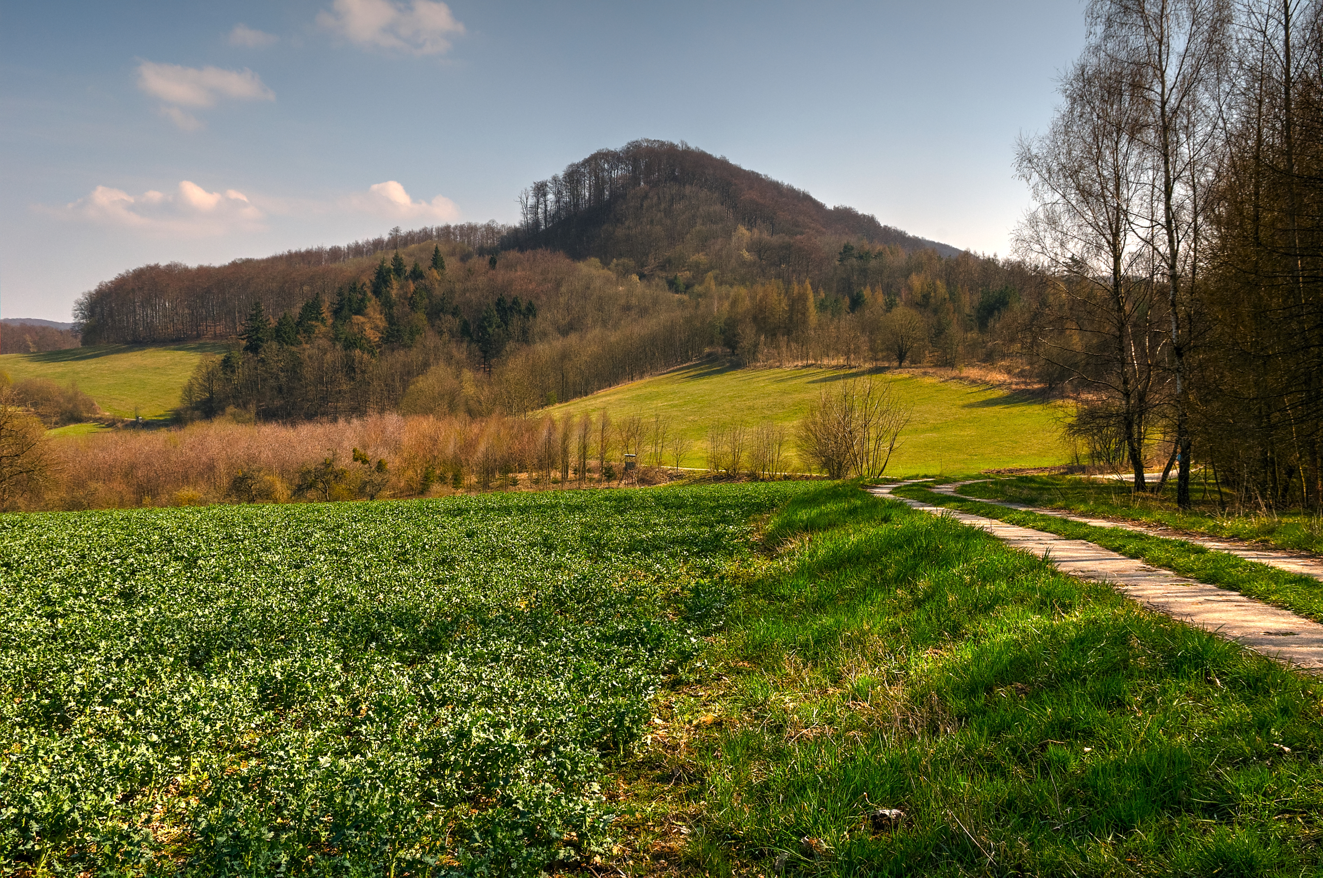 Keudelskuppe Blick von West, der Verlauf des Kolonnenweges rechts ist bis in den Wald unterhalb die Keudelskuppe erkennbar